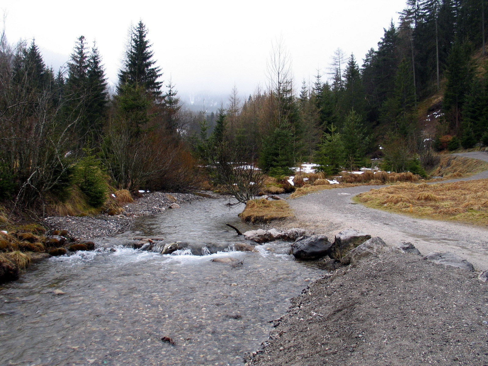 de Lisach in Biberwier, Oostenrijk